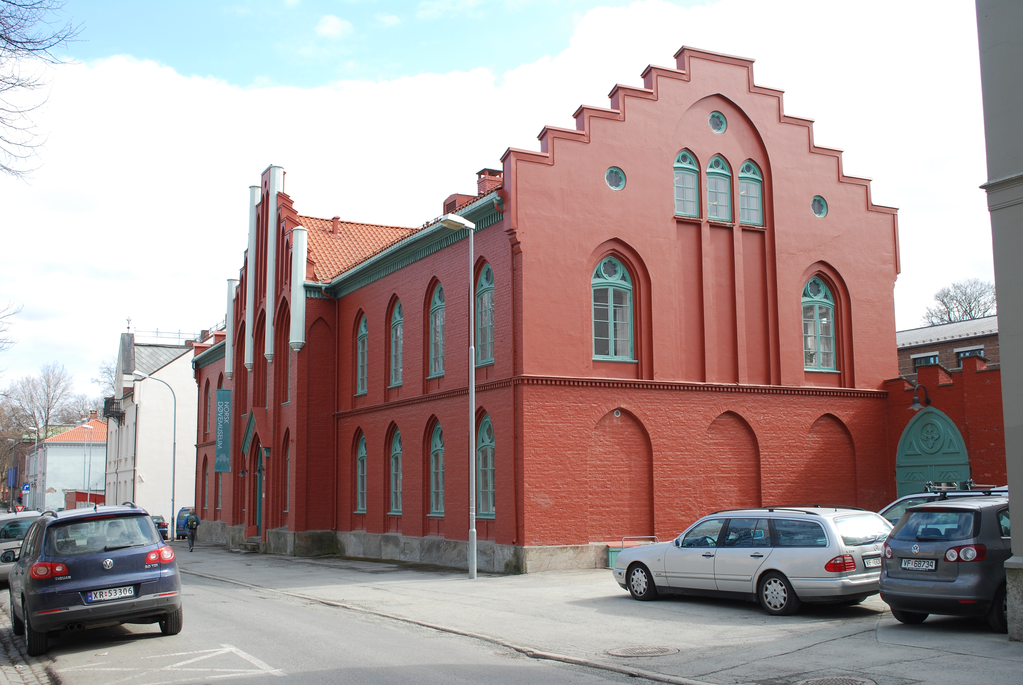 Døvehistorisk museum, Trondheim gamle døveskole, i Bispegata 9b i Trondheim.